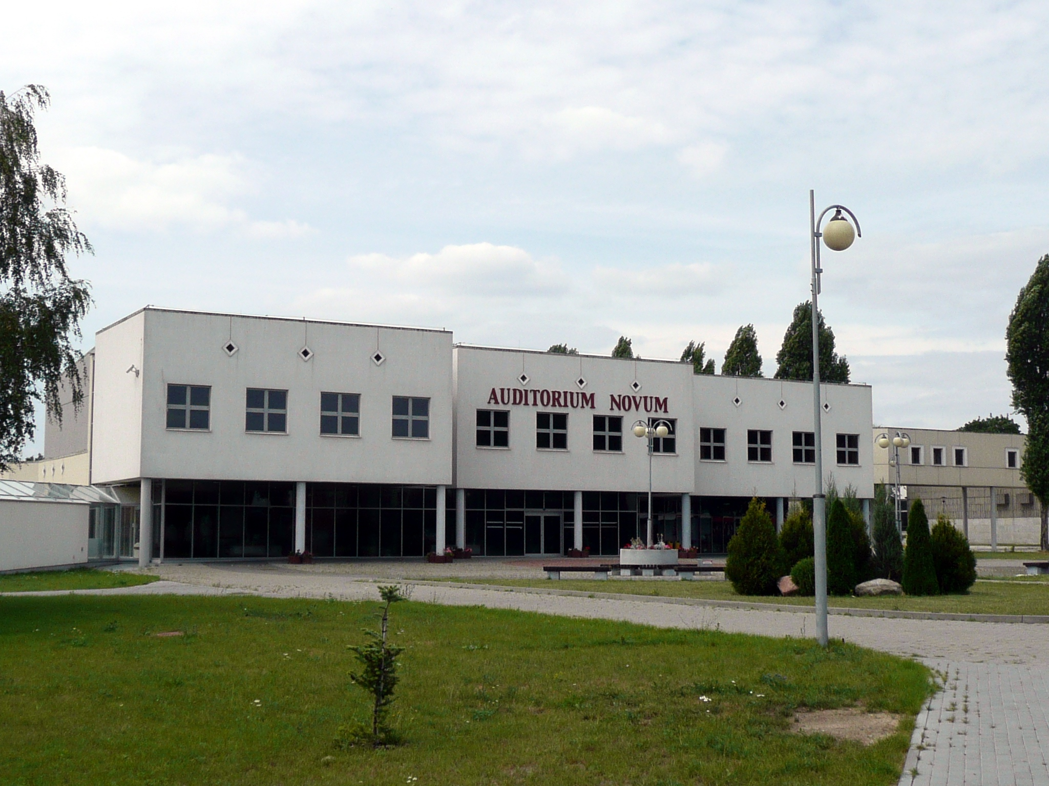 Uniwersytet Technologiczno-Przyrodniczy im. Jana i Jędrzeja Śniadeckich w Bydgoszczy, Auditorium Novum